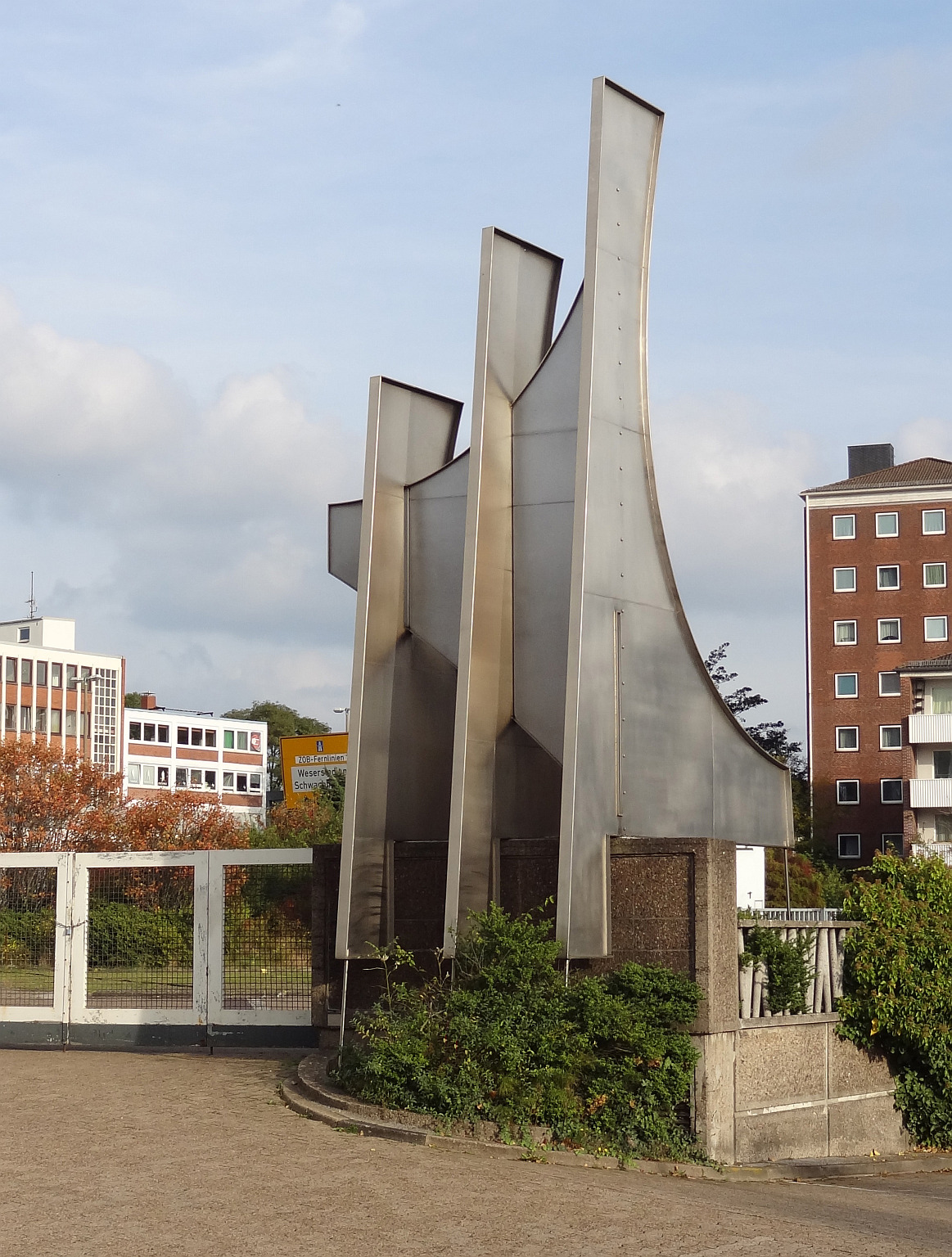 Edelstahlskulptur "Segel" von Hans Dieter Bohnet in der Falkenstraße, Bremen